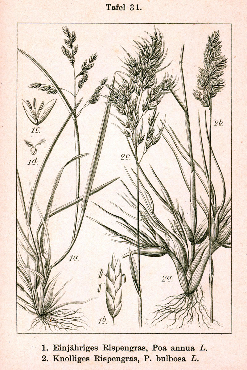 Original Description 1. Einjähriges Rispengras, Poa annua L. 2. Knolliges Rispengras, Poa bulbosa L.